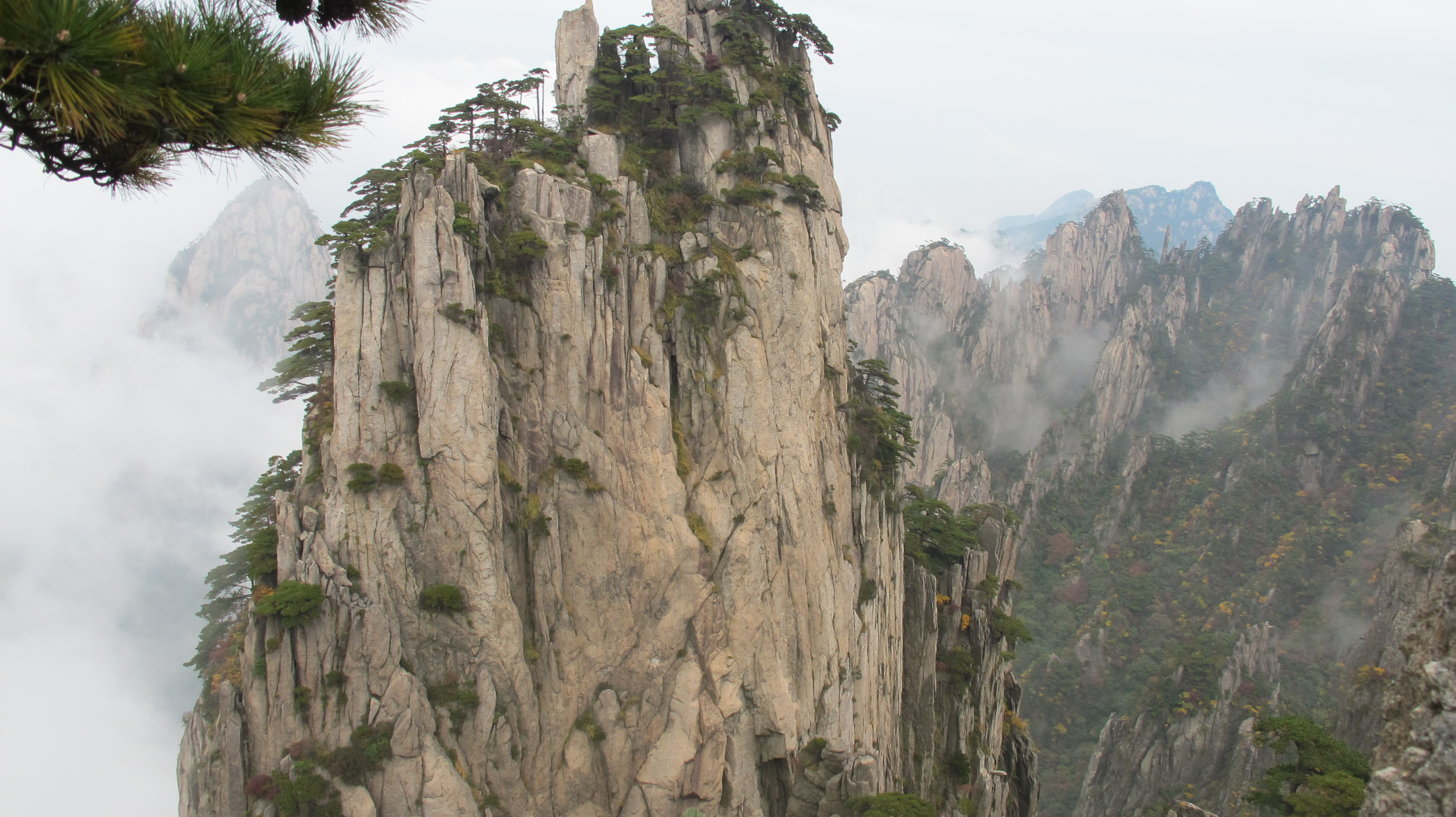 黄山始信峰风光